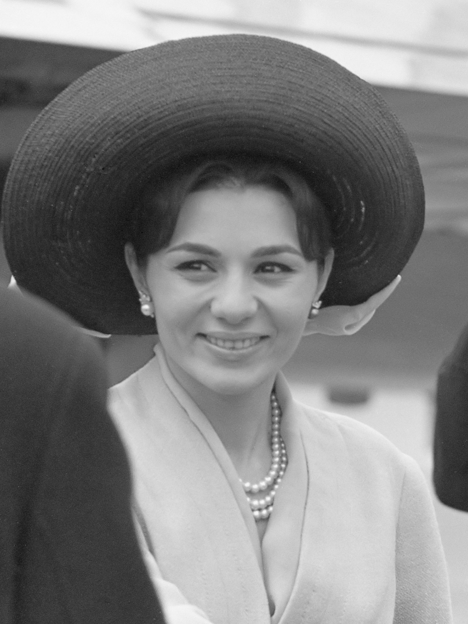 Einde van het feest vertrek Koninklijke gasten Farah Diba 3 mei 1962